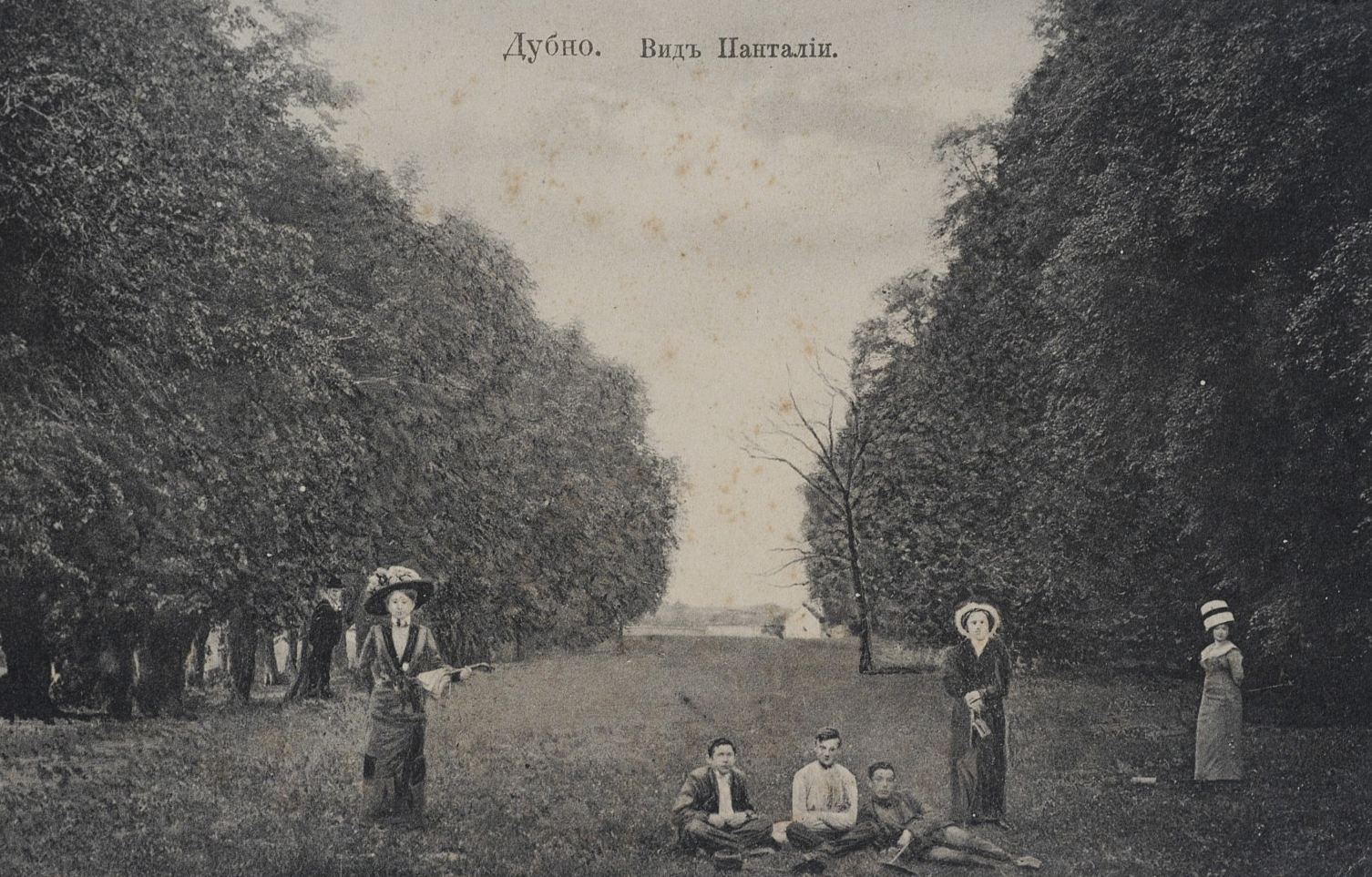 Дубно. Вид Панталії. Видання крамниці книжок і писального паперу А. Бухбіндера, Дубно, Волинської губернії.